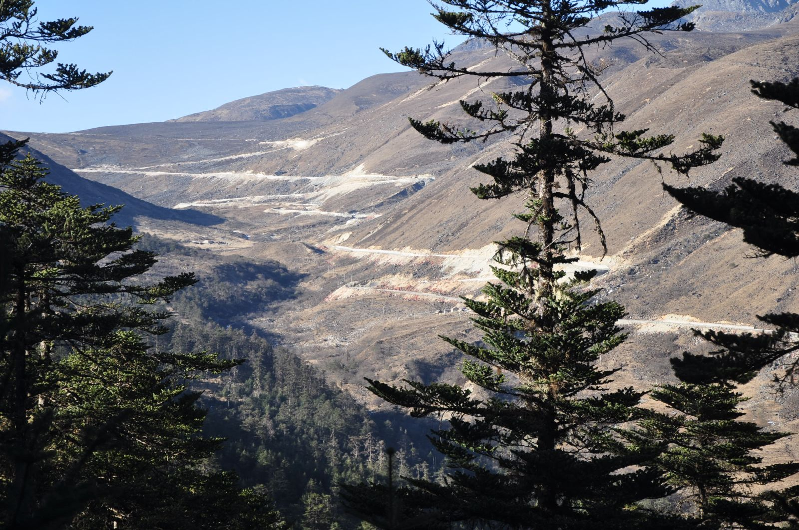 Abies fabri, Ganzi Zangzu, Sichuan, China; 29 deg 51' 45.94" N 102 deg 1' 41.38" E, 3,600m altitude.